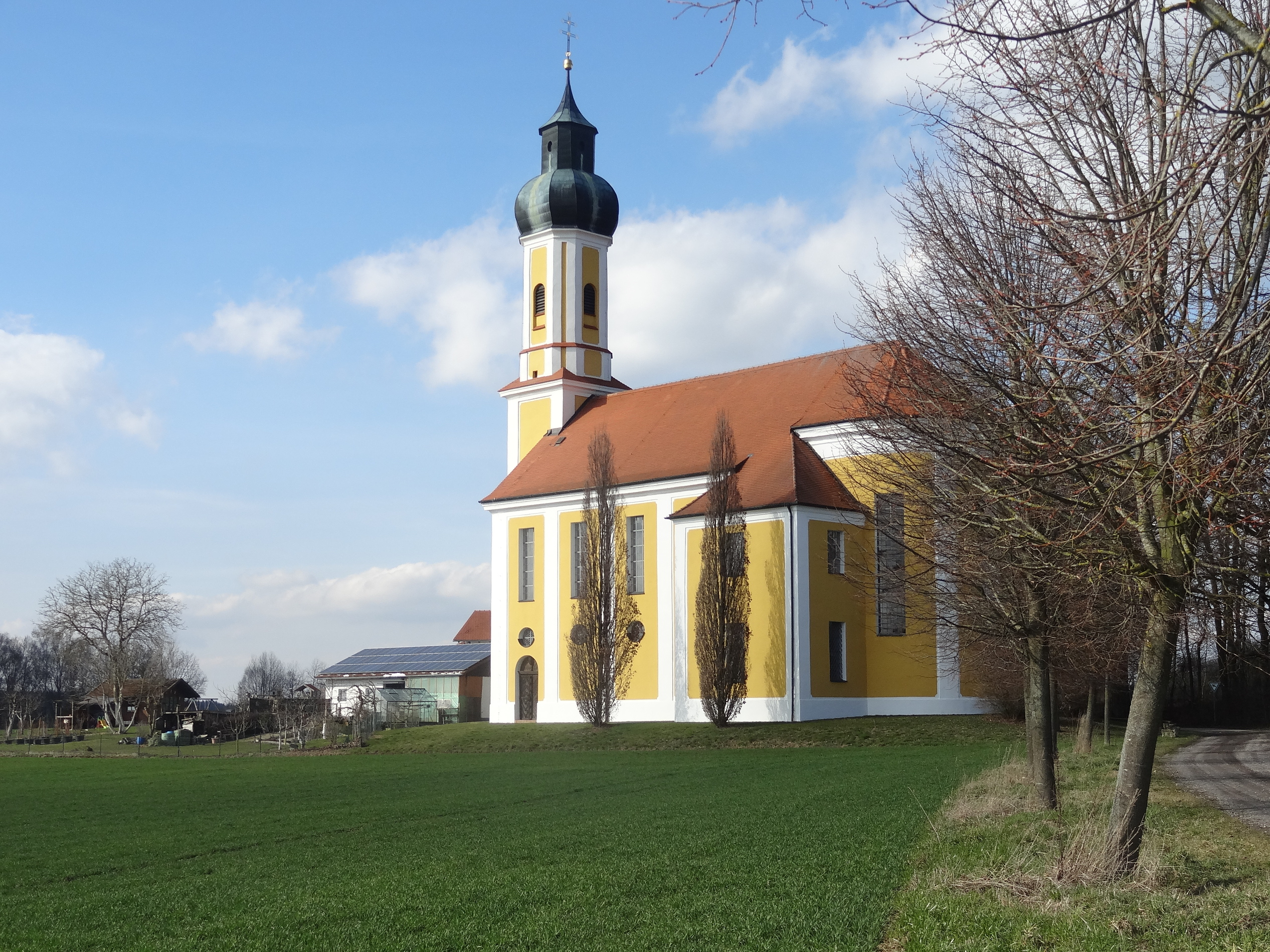 Außenansicht der Wallfahrtskirche St. Salvator in Binabiburg, barocke Wandpfeilerkirche mit Westturm, 1710-30 errichtet